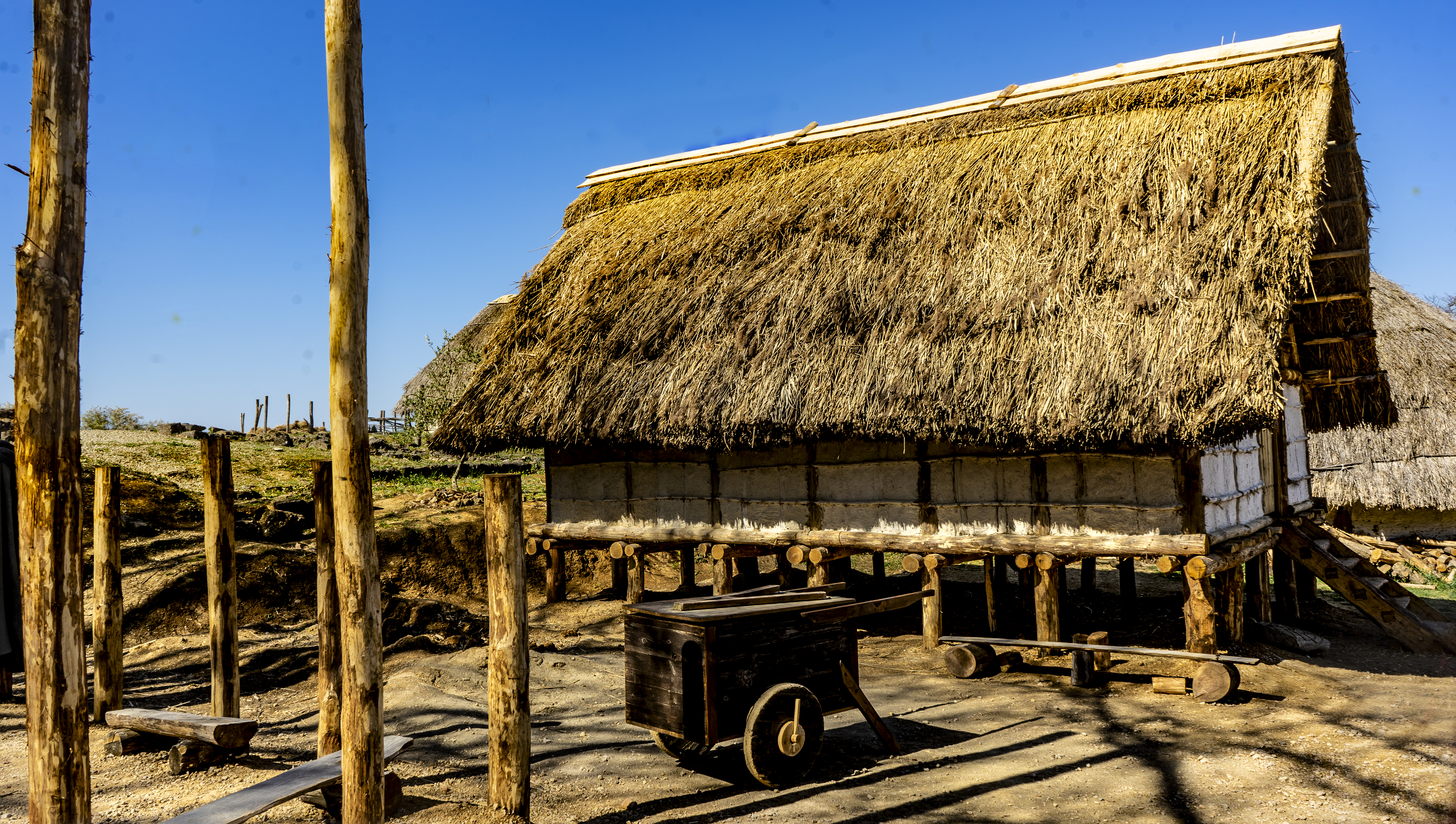 All'interno delle Mura della Fortezza di Poggio Imperiale This is a photo of a monument which is part of cultural heritage of Italy.